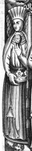 Tombeau de Marie, Impératrice d'Allemagne